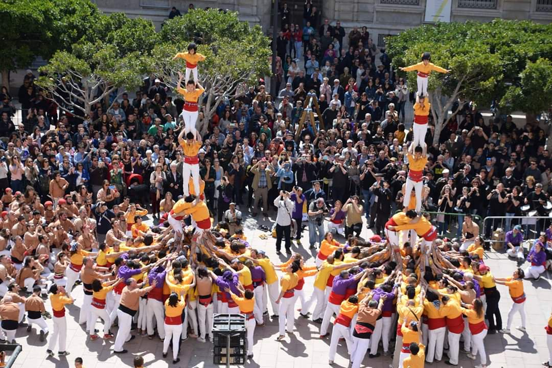 2 Moreres. TrobadaCS. 2019